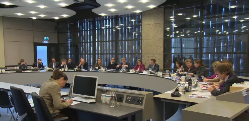 Een Commissievergadering in een commissievergaderzaal in de Tweede Kamer